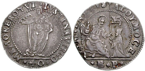 Italia, Venezia. doge Alvise I Mocenigo. 1570-1577. AR 40 Soldi o Giustina (8.28 g, 6h). zecchiere Benetto Pisani. Battuta 1574 (o 1572 ?). MEMOR ERO TVI*IVSTINA VIRGO, *40* IN EXERGUE, Santa Giustina di fronte, la spada infilata nel petto, che tiene palma e libro S•M•VENETVS ALOY•MOCE, *B*P* in esergo, San Marco Evangelista che consegna lo stendardo al Doge inginocchiato. La moneta commemora la vittoria di Lepanto, avvenuta il 7 ottobre, Santa Giustina. Italy, Venice. Alvise I Mocenigo. 1570-1577. AR 40 Soldi or Giustina (8.28 gm, 6h). Benetto Pisani, moneyer. Struck 1574 (or 1572 ?). MEMOR ERO TVI*IVSTINA VIRGO, *40* IN EXERGUE, St. Giustina facing, sword piercing breast, holding palm and book S•M•VENETVS ALOY•MOCE, *B*P* in exergue, St. Mark presenting banner to kneeling Doge. The coin commemorate the Battle of Lepanto, which took place on 7 October, the day of St. Giustina CNI VII 55; Papadopoli 22; Paolucci 7.